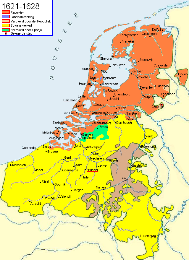 Krijgsbewegingen in de tachtigjarige Oorlog. 1621-1628.